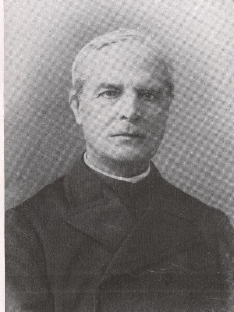 Kardinal Franziskus Ehrle, Rom